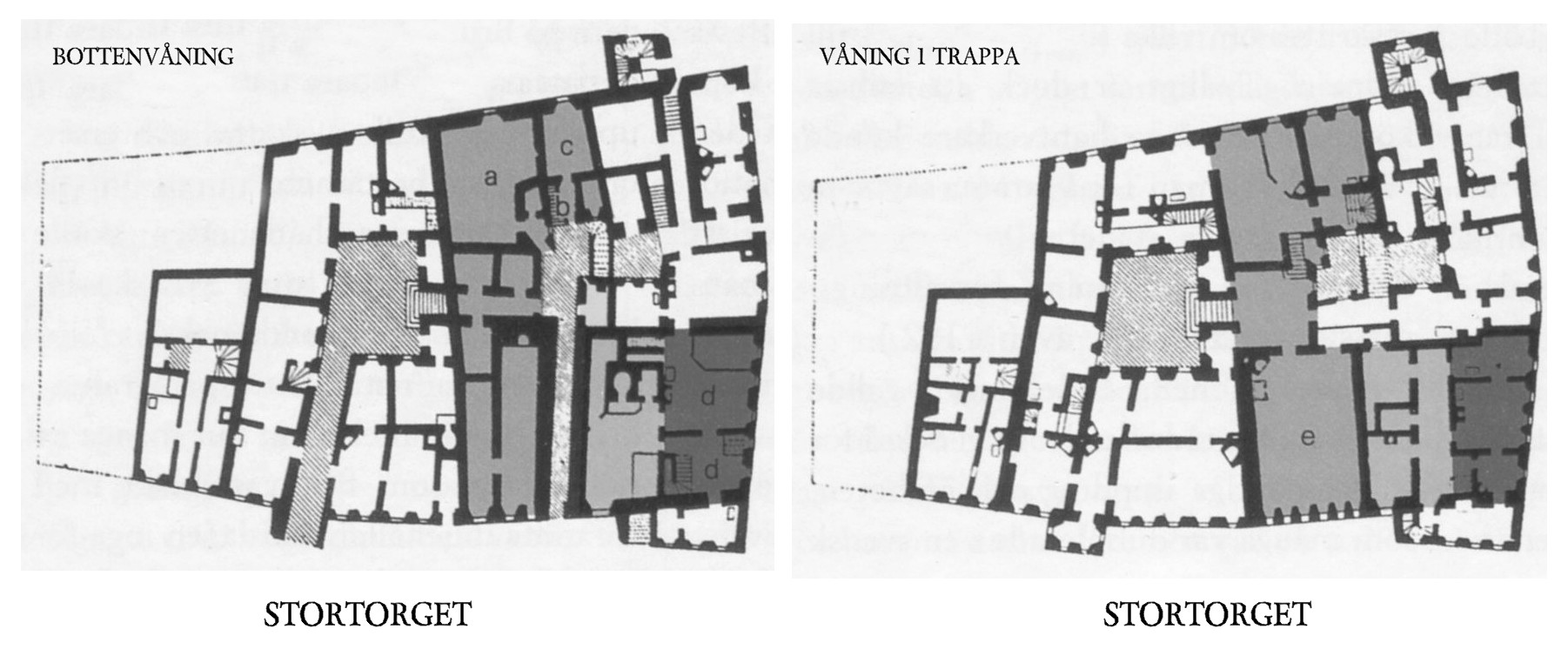 Uppmätningsritning för Stockholms gamla rådhus (rådstugan) vid Stortorget. Kompl. med text av Holger.Ellgaard (talk) 09:37, 24 November 2010 (UTC) Förklaringar: a=den gamla rådstugan använd till 1487, b=trappan ner till häktet, c=1600-talsarrest, även skottkammaren, d=vinkällare Fuhrmannska källare, e=den senmedeltida rådstugan använd från 1488